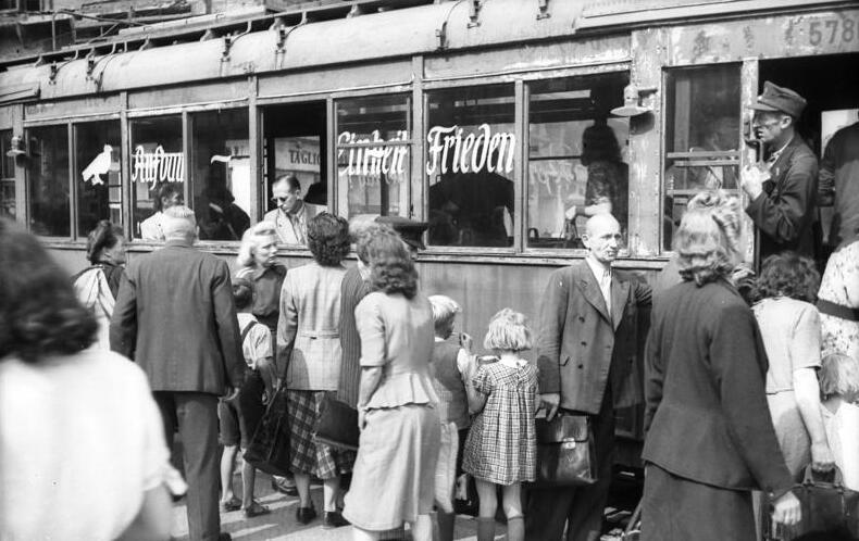 Berlin: Auch ein Straßenbahnwagen der Linie 74 wirbt für den Friedenstag am 1.9.49. Aufn.: Illus/Kümpfel S 87 570 3847-49 31.8.49